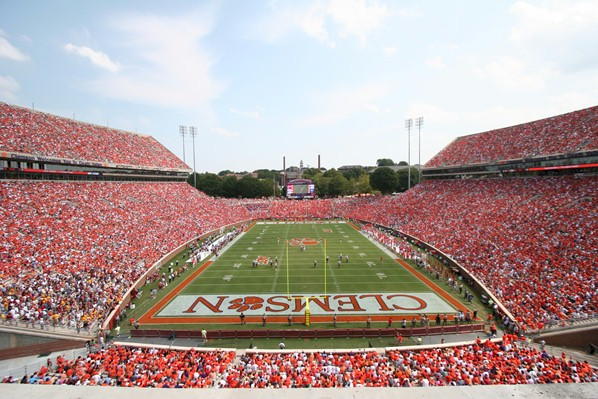 photo du stade de Clemson (football américain universitaire) : Clemson Memorial Stadium source : Wikipédia.en "Image:Gloriousclemson.jpg" où ce cliché a été enregistré sous la licence "GFDL"